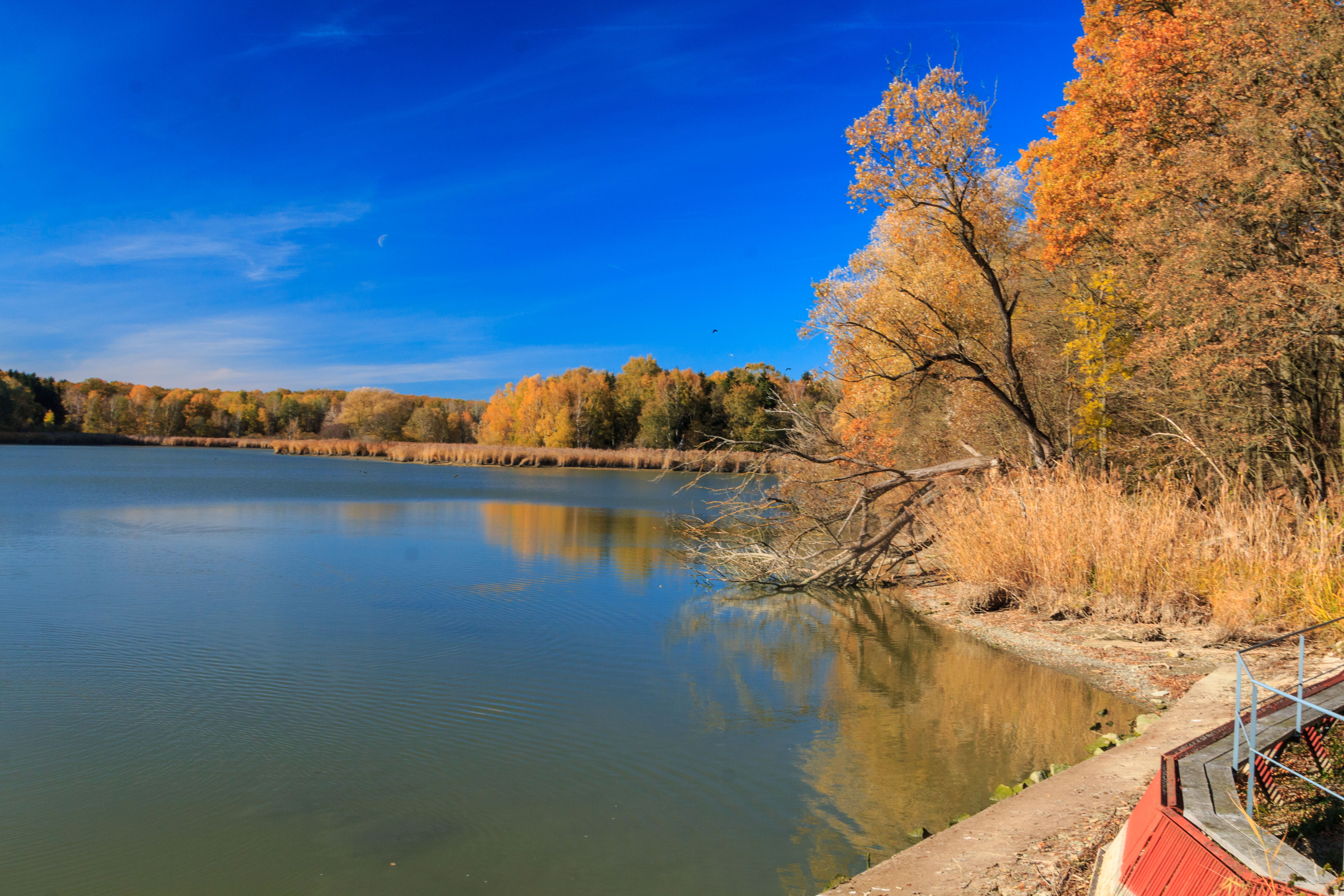 Pilský rybník u Brodku u Dětěnic